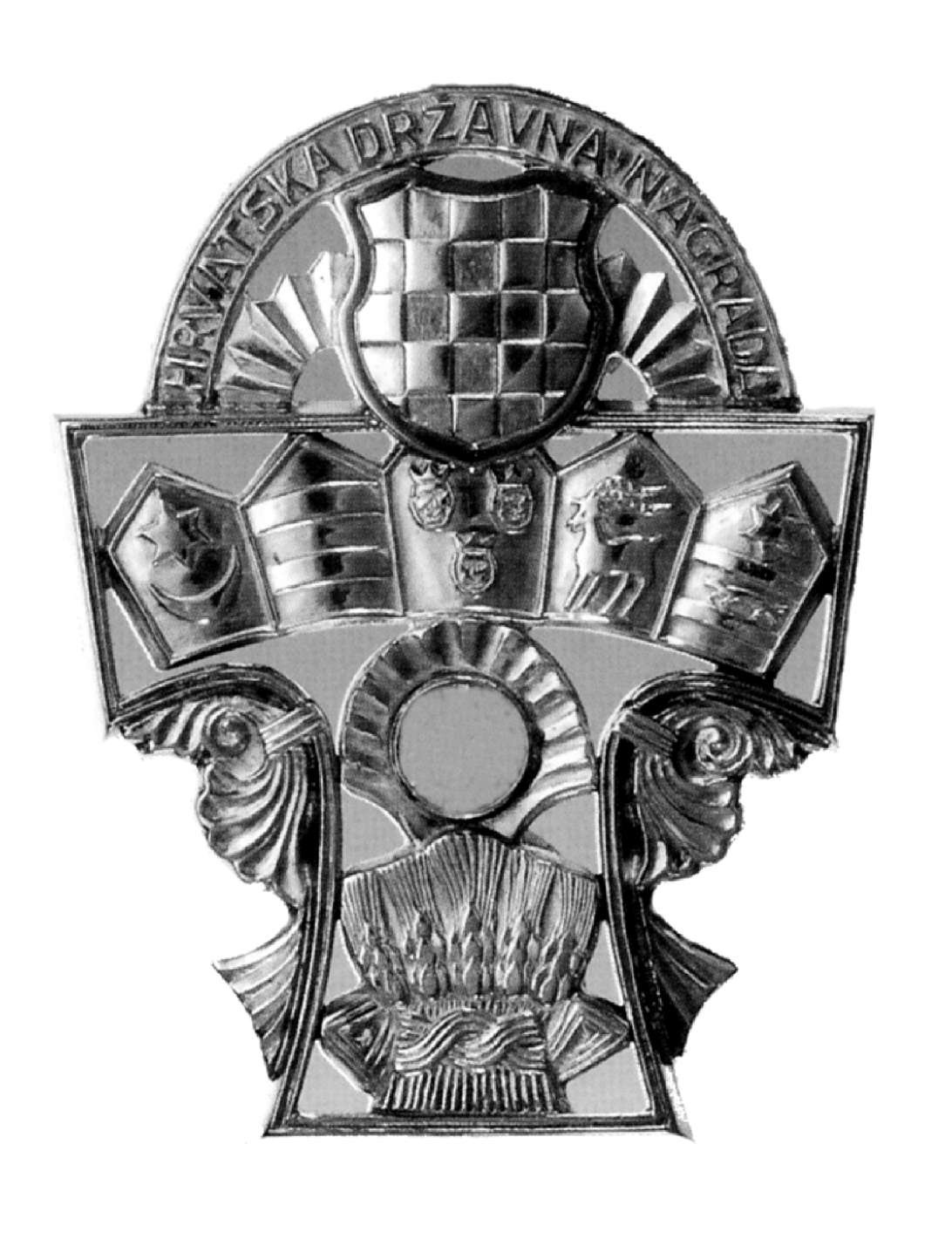 Hrvatska državna nagrada (veliki znak)